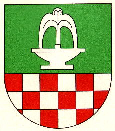 Wappen von Schwollen